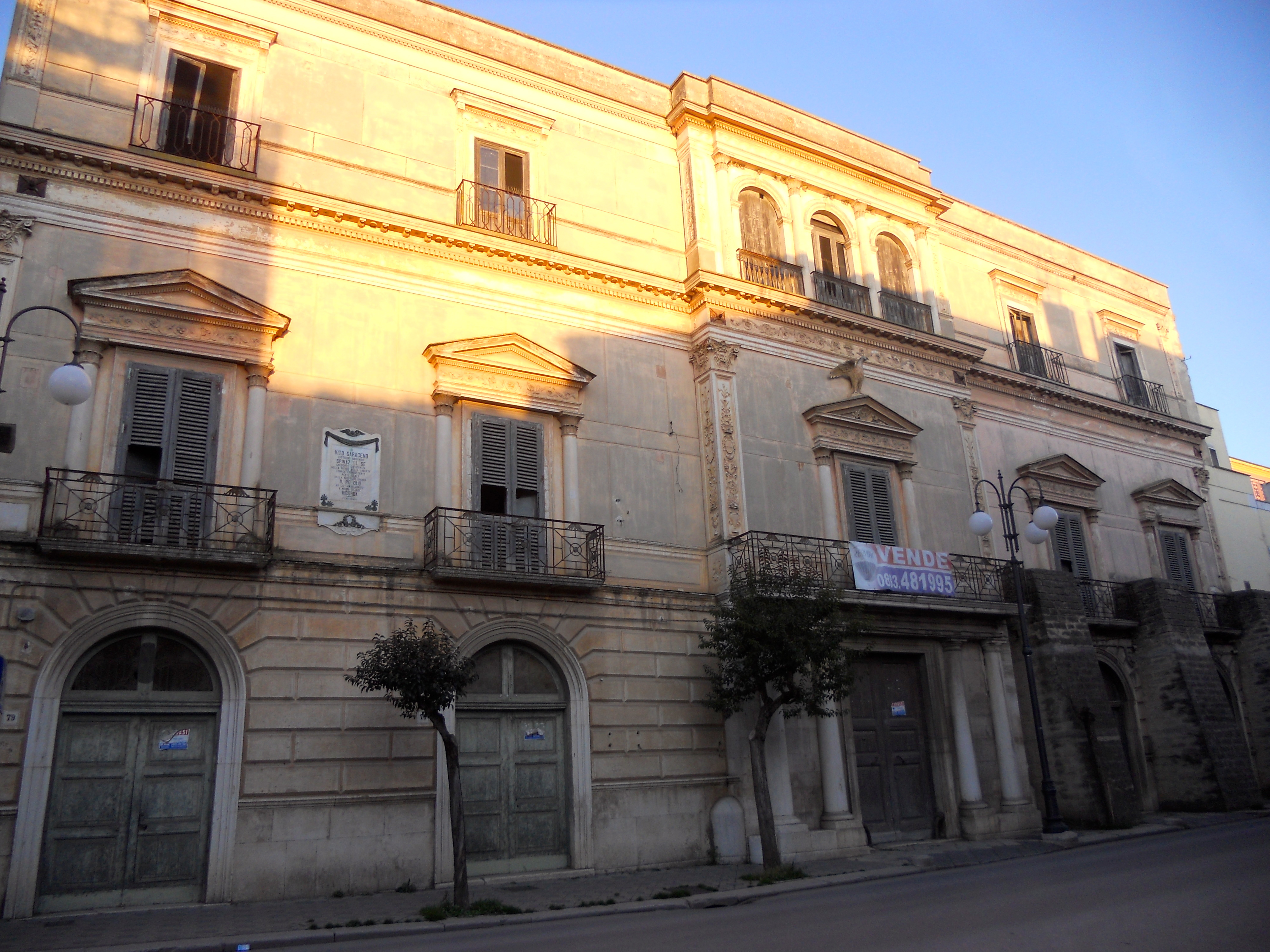 Palazzo Saraceno prende il nome dal personaggio più illustre a cui è appartenuto, Vito Saraceno, sindaco di Spinazzola.